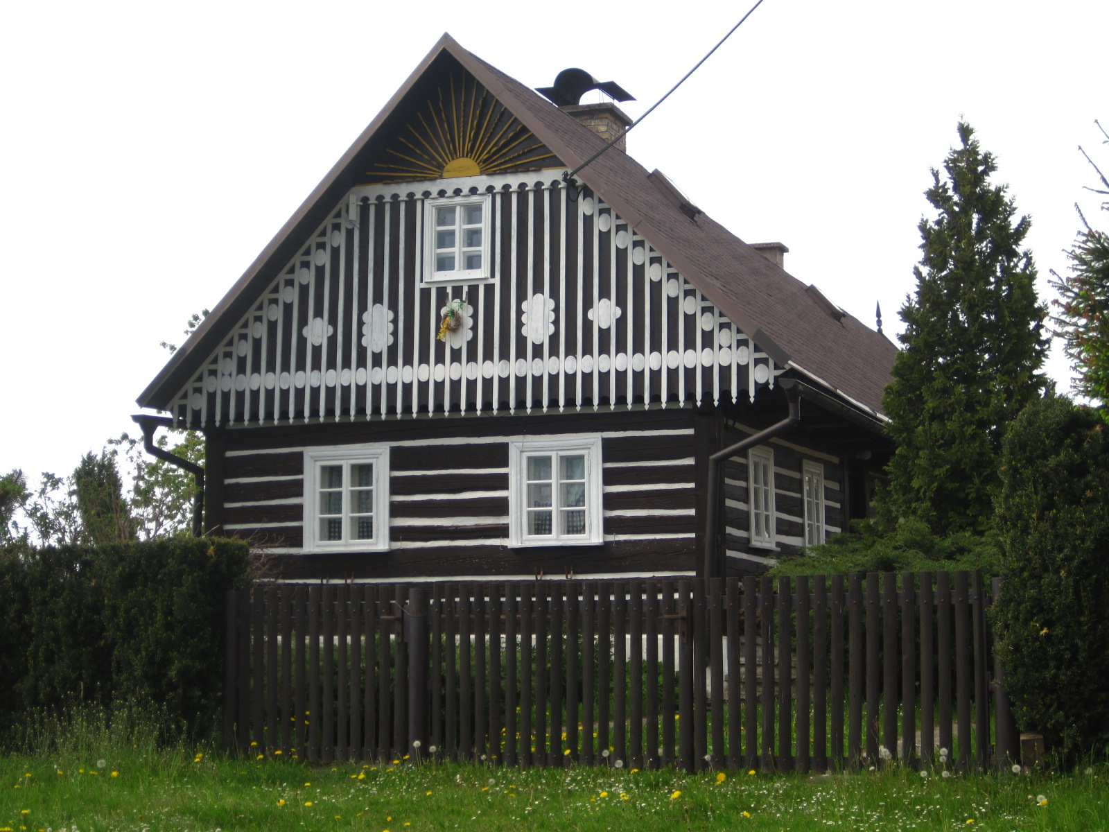 Dobřany (v Orlických horách) - chalupa poblíž kostela